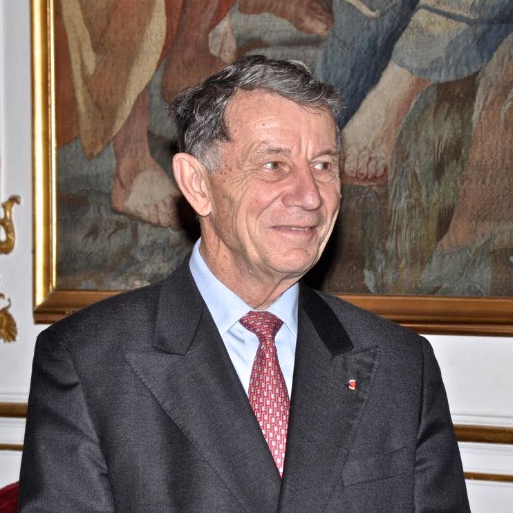 Amiral LANXADE à la mairie de Strasbourg